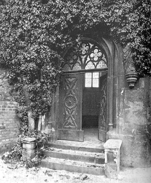 Braunschweig, Maria-Magdalenen-Kapelle: Portal